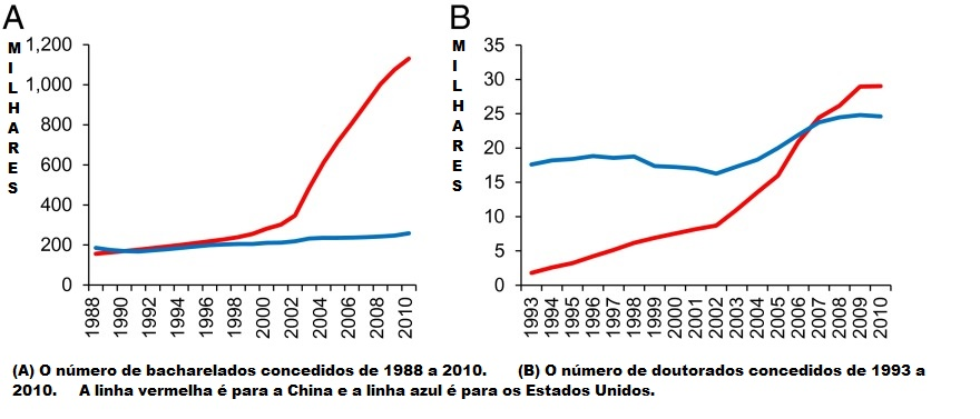 Grafico do número de bacharelados concedidos de 1988 a 2010 e o número de doutorados concedidos de 1993 a 2010.